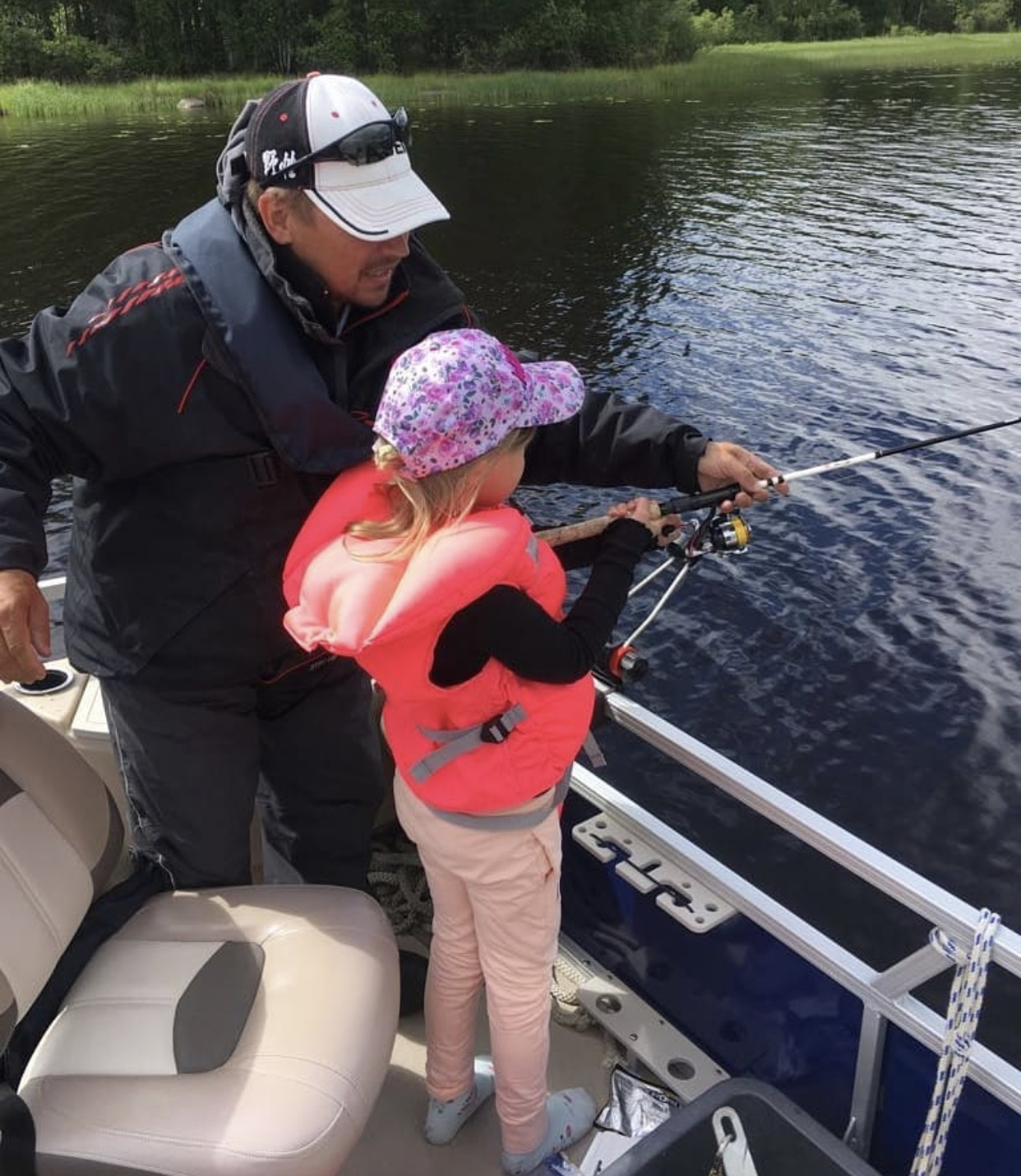 Kalastusopas Juha Happonen opettamassa jigikalastusta suomalaisella järvellä.